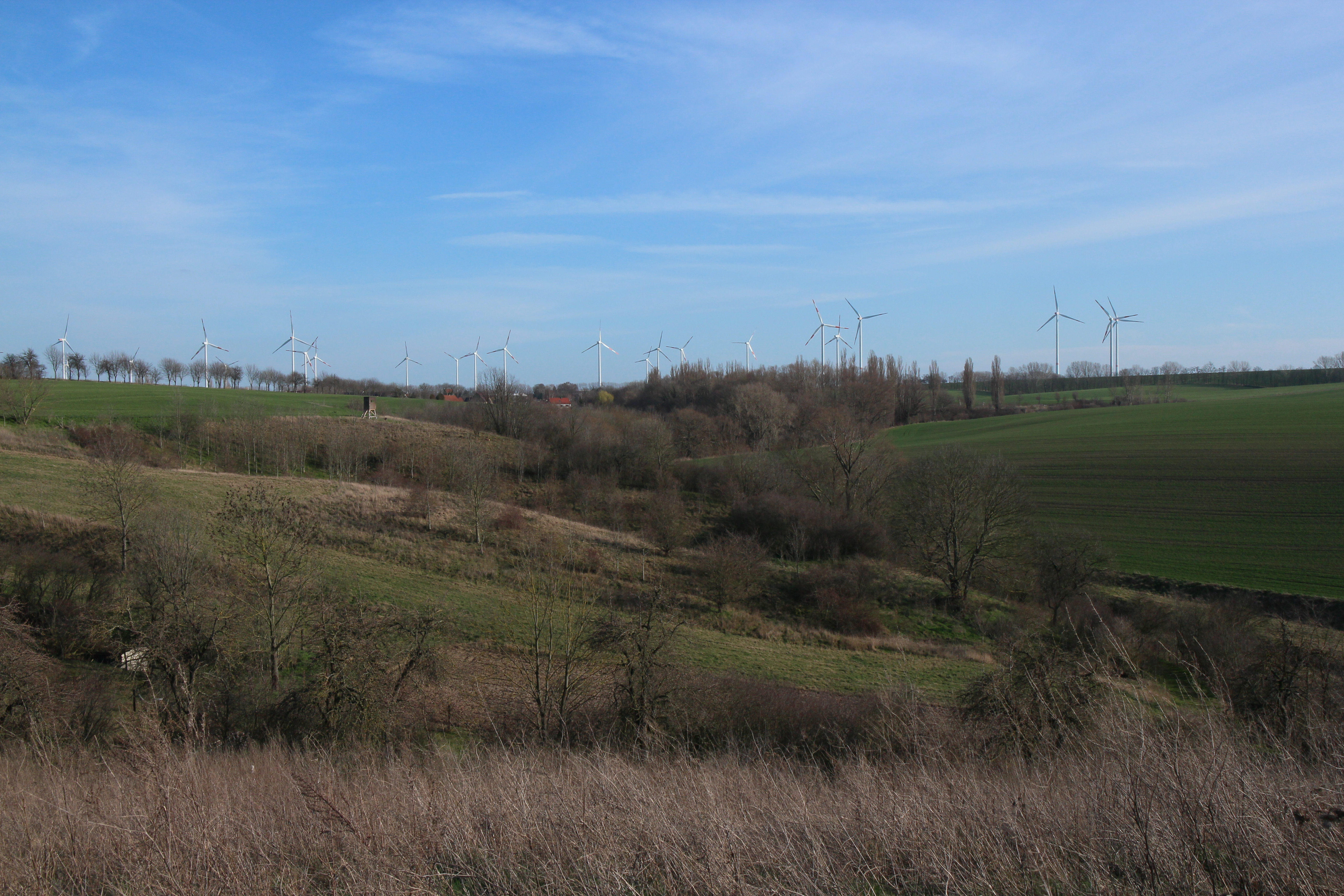 Blick vom Burgberg Bösenburg nach Rottelsdorf